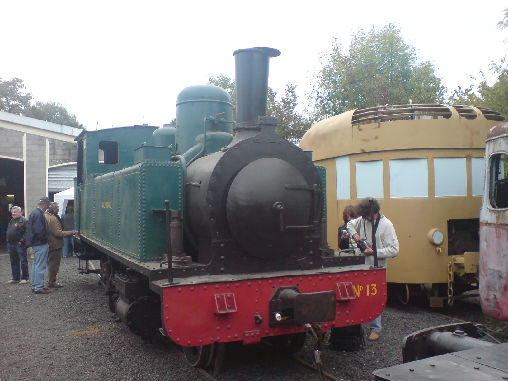 Locomotive construite par "SACM" type 130 T (1924) N°13 du MTVS (Musée des tramways à vapeur et des chemins de fer secondaires français).